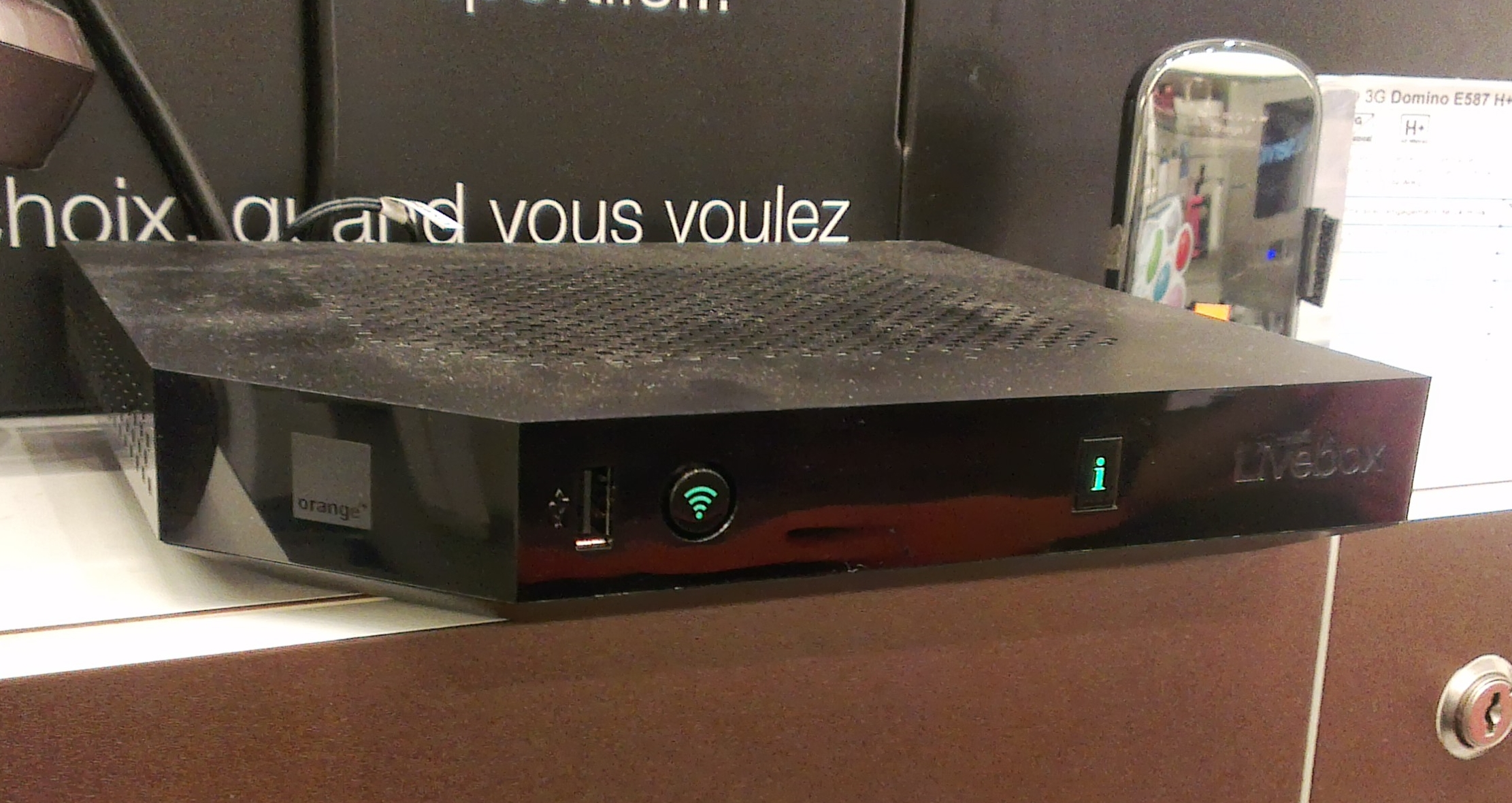 Livebox Play, en exposition dans une boutique de l'opérateur Orange.